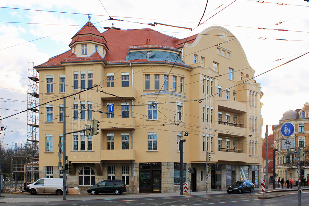 Capahaus Leipzig